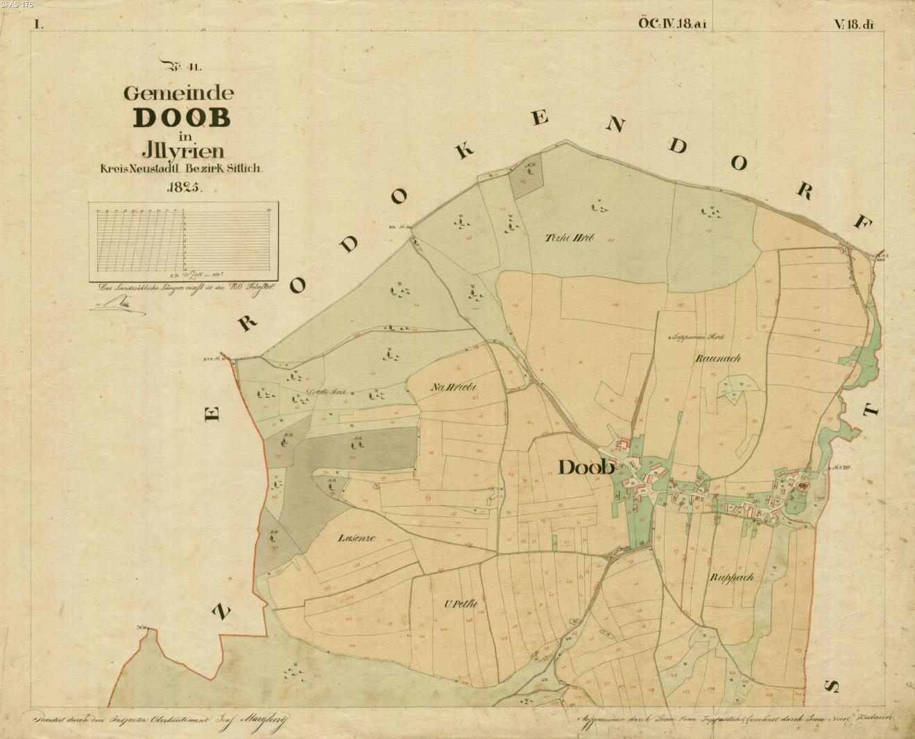 Dob na mapi francisejskega katastra za Kranjsko iz leta